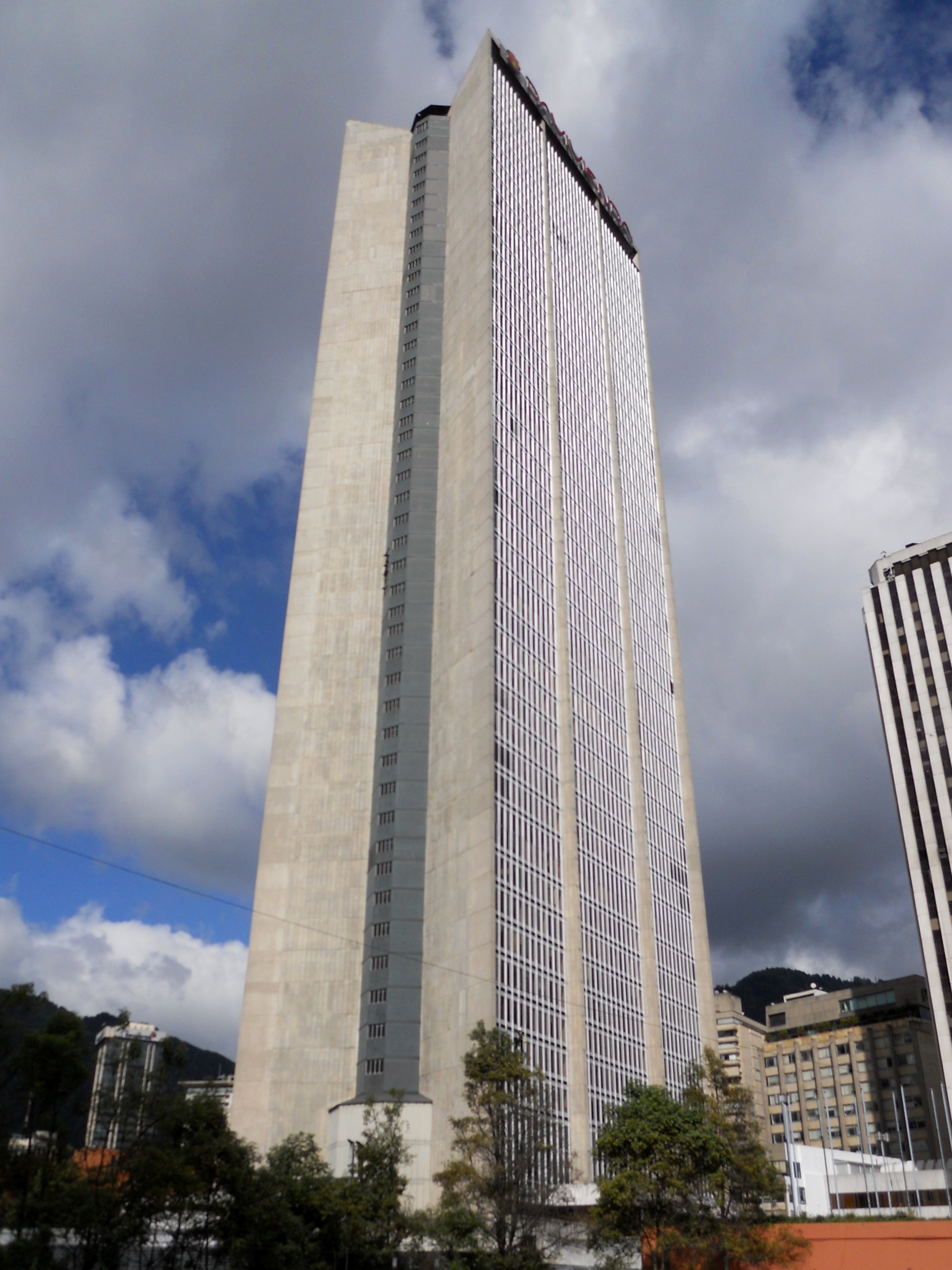 Bogotá, centro de comercio Internacional.